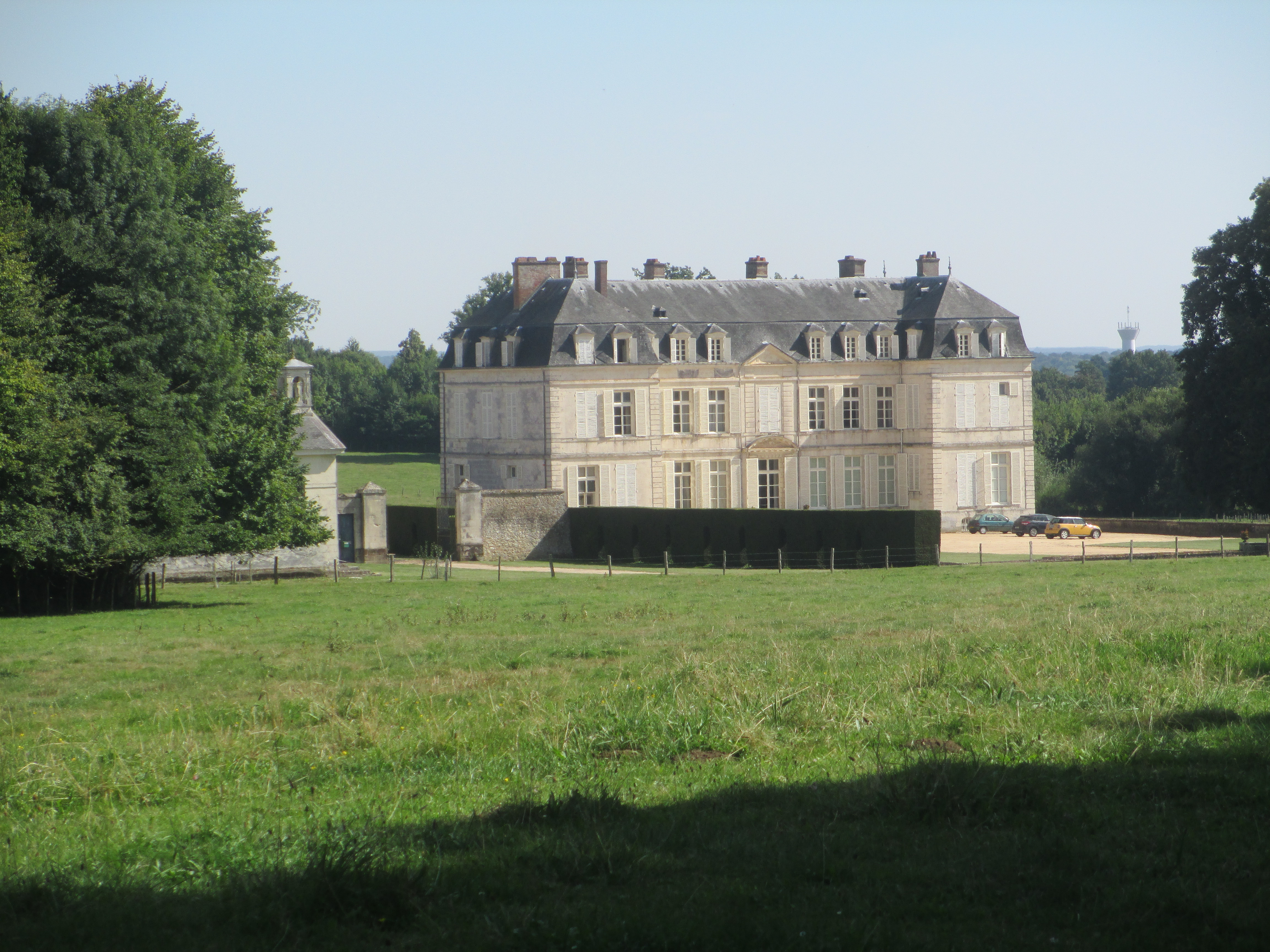 Château de Voré, à Rémalard, dans l'Orne. .